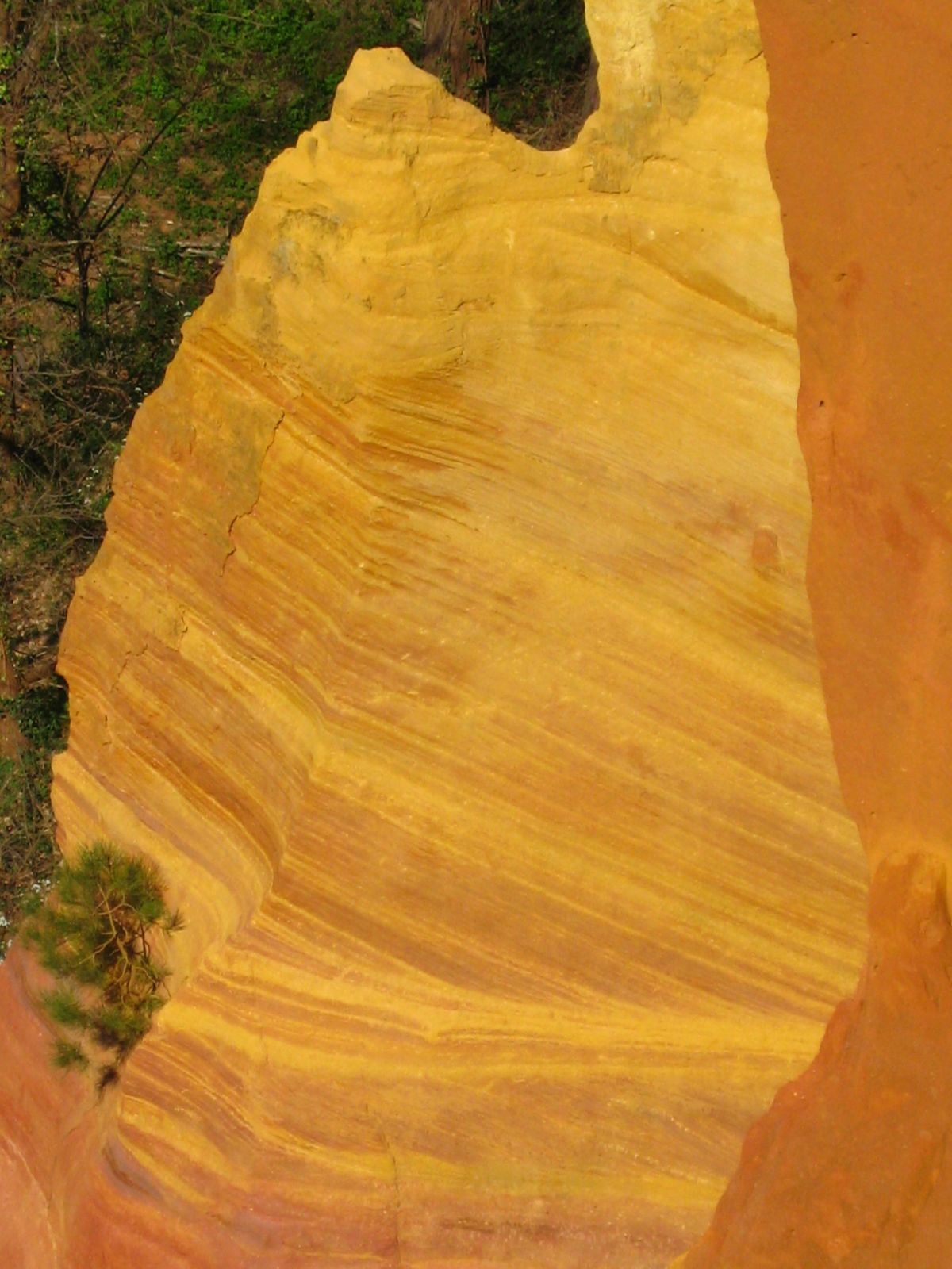 Ochre quarry, Roussillon, France